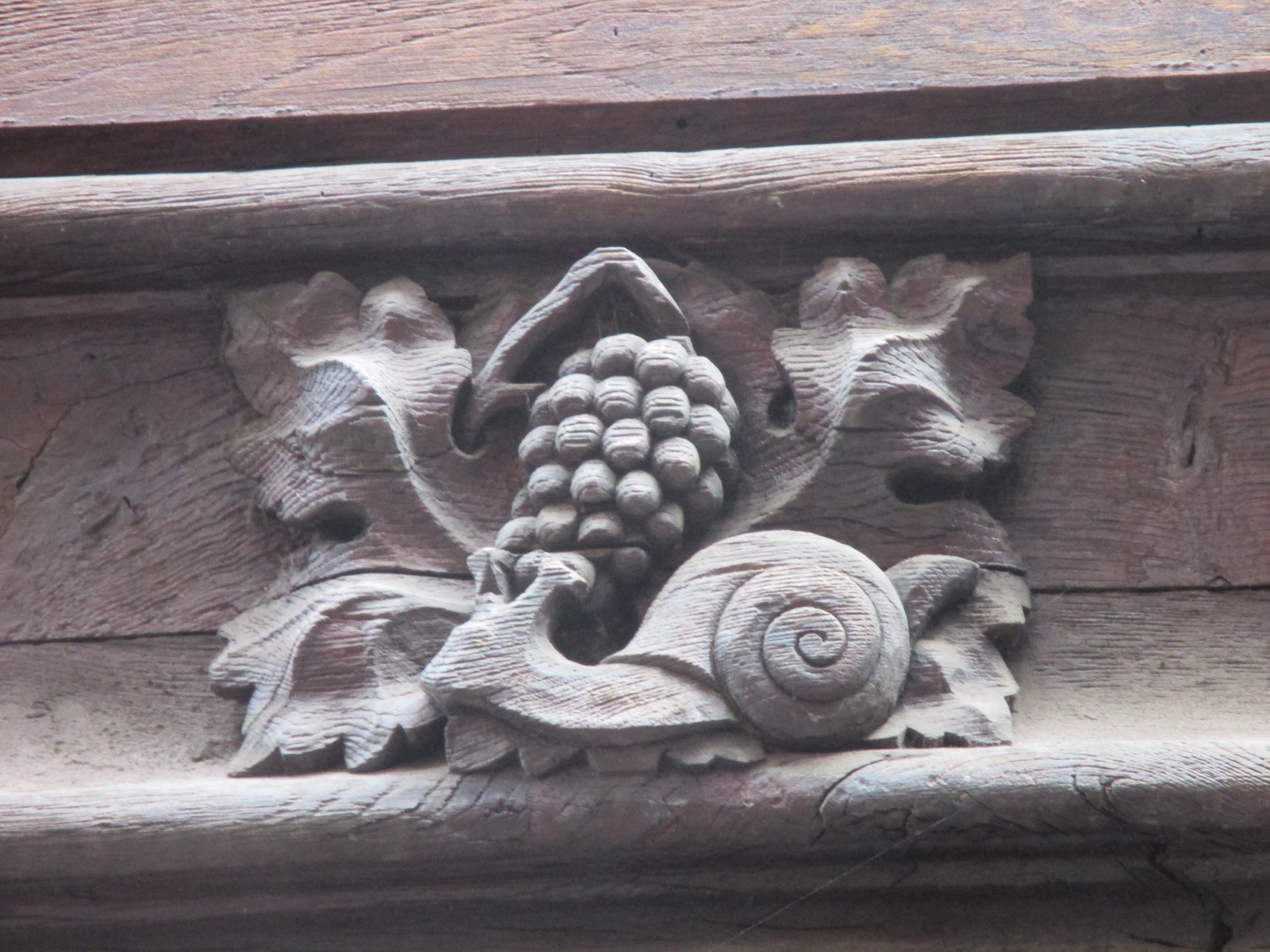 Sculpture sur bois : escargot de bourgogne dans le vignoble de Bourgogne